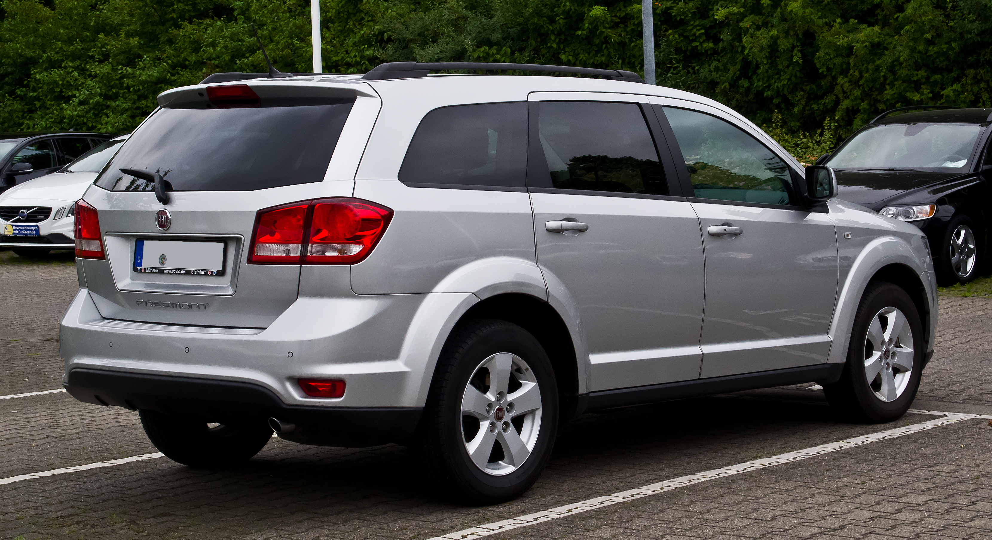 Fiat Freemont 2.0 16V Multijet